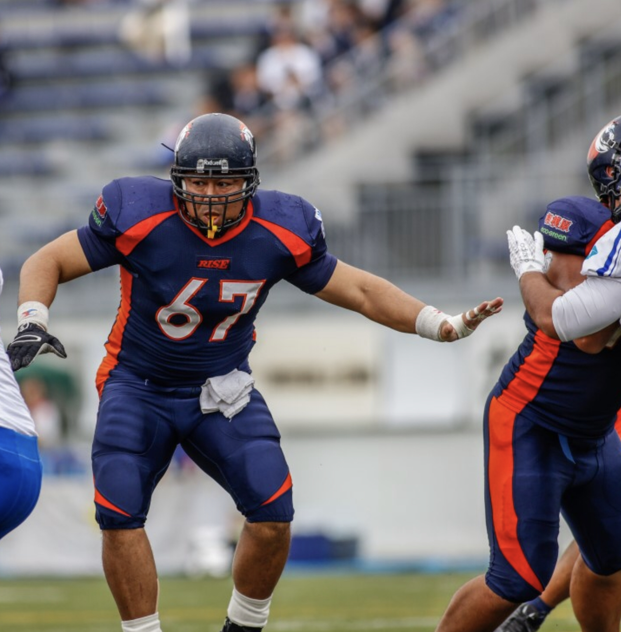 鴨志田正樹プレー写真